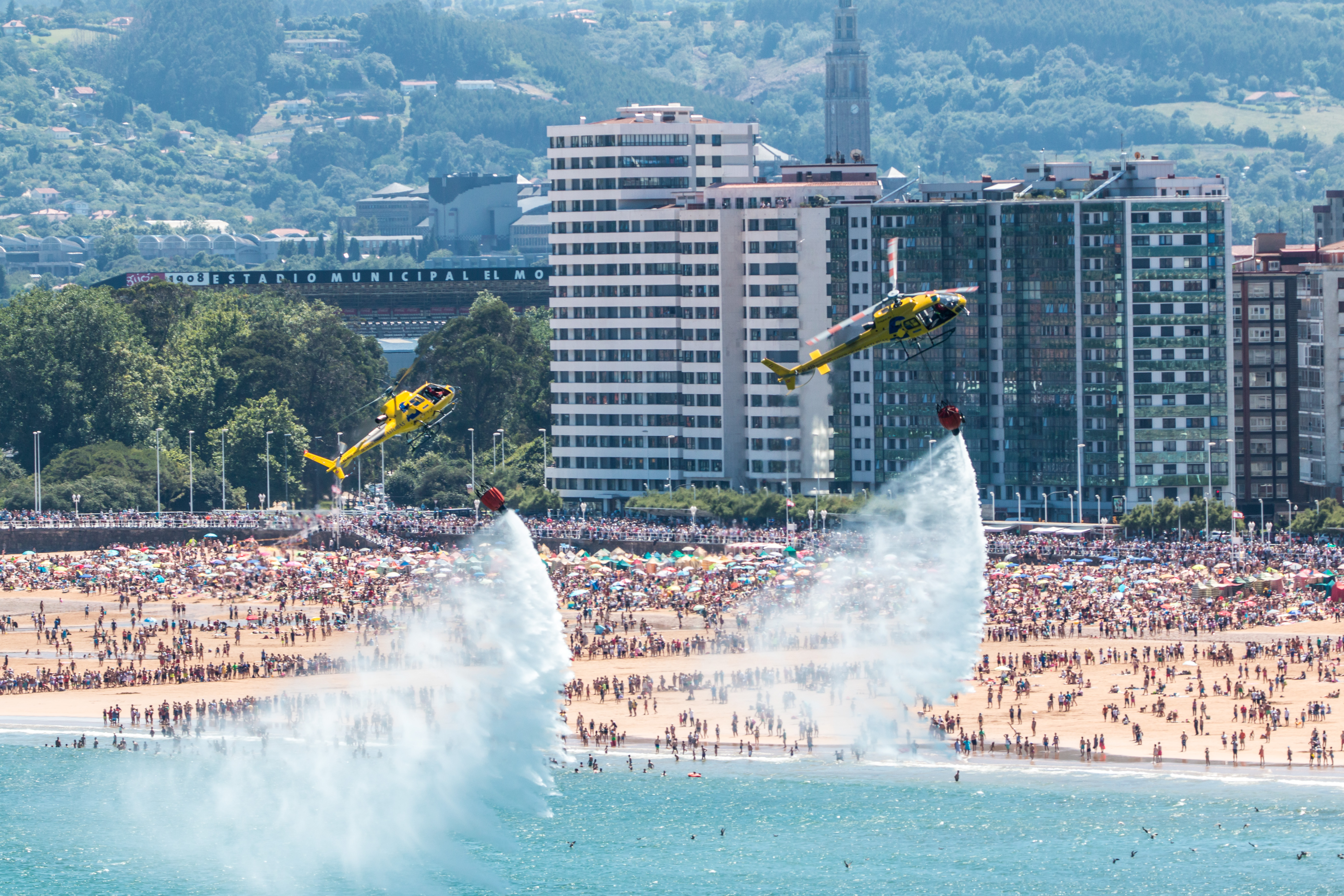 Bomberos. Festival Aéreo Internacional De Gijón. Gijón 2016.